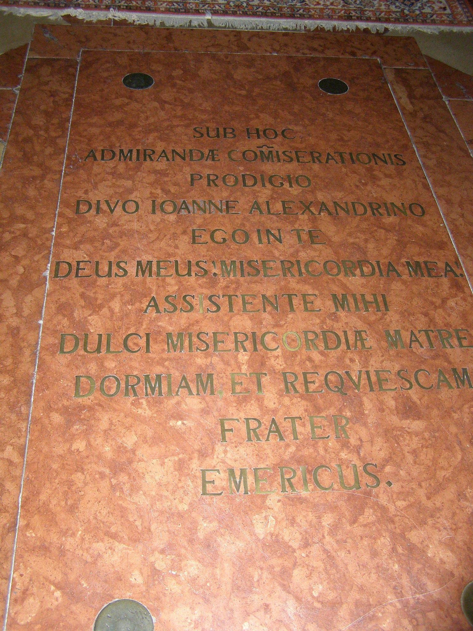 Náhrobná tabuľa nad kryptou s pozostatkami arcibiskupa Imricha Esterházyho v podlahe kaplnky svätého Jána Almužníka